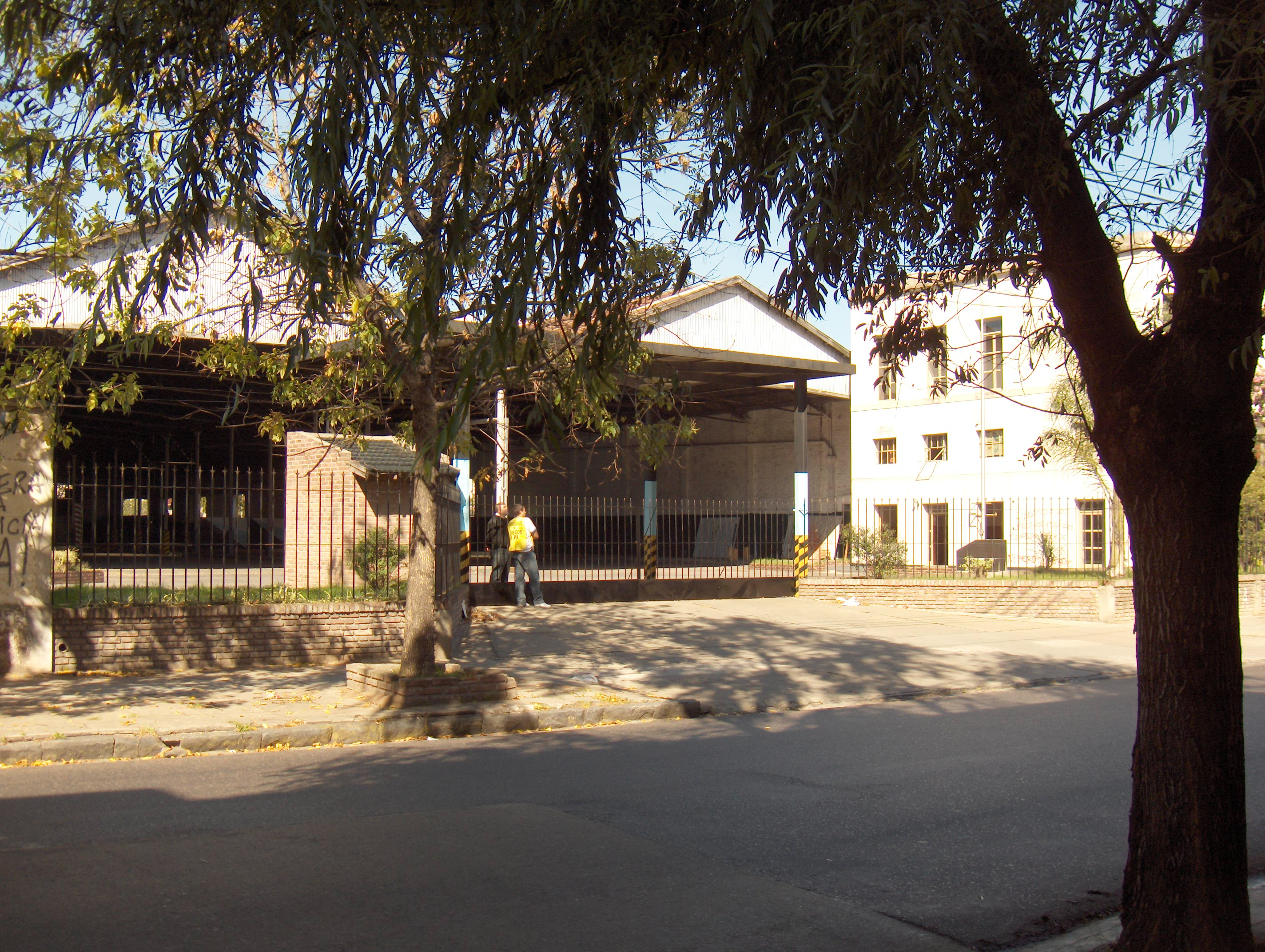 "El Olimpo", Centro Clandestino de Detención ubicado en el barrio Floresta de Buenos Aires.